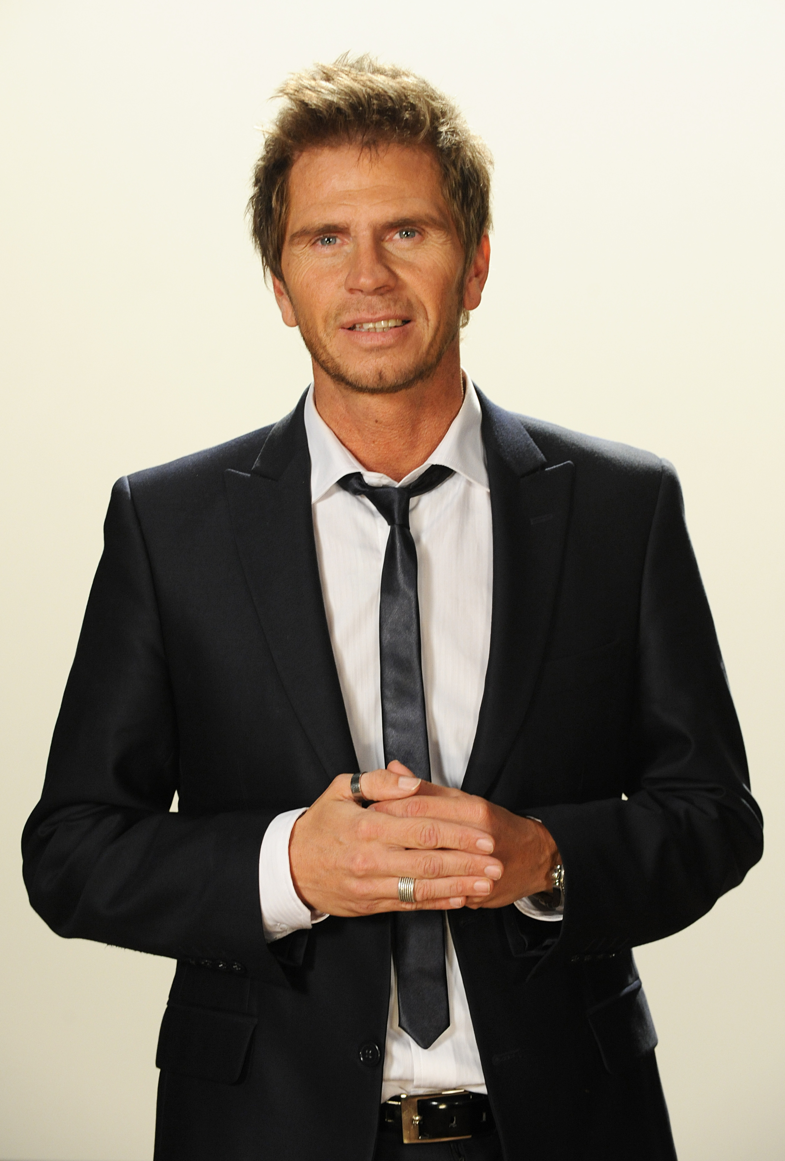 El Pollo Vignolo